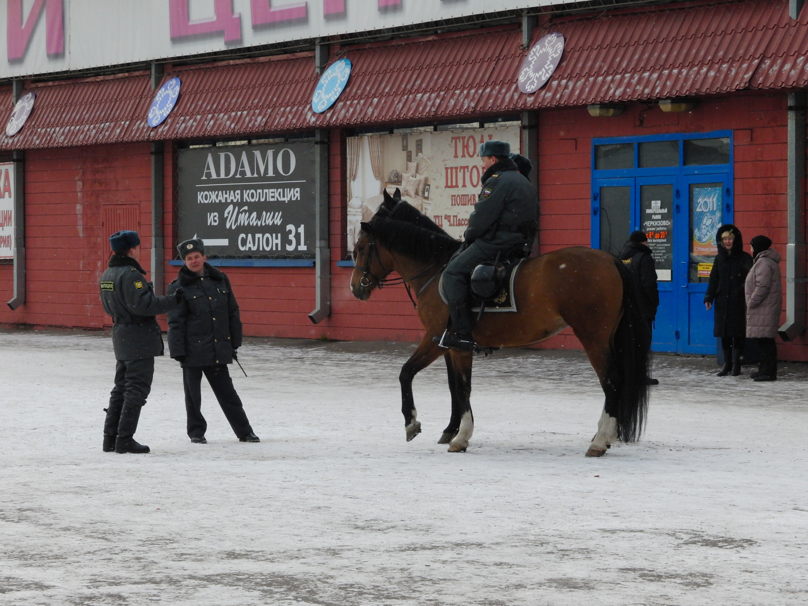 Cherkizovskaya, policemans preparing to guard a footbal stadium (Черкизовская, милиционеры, готовящиеся охранять стадион во время футбольного матча)